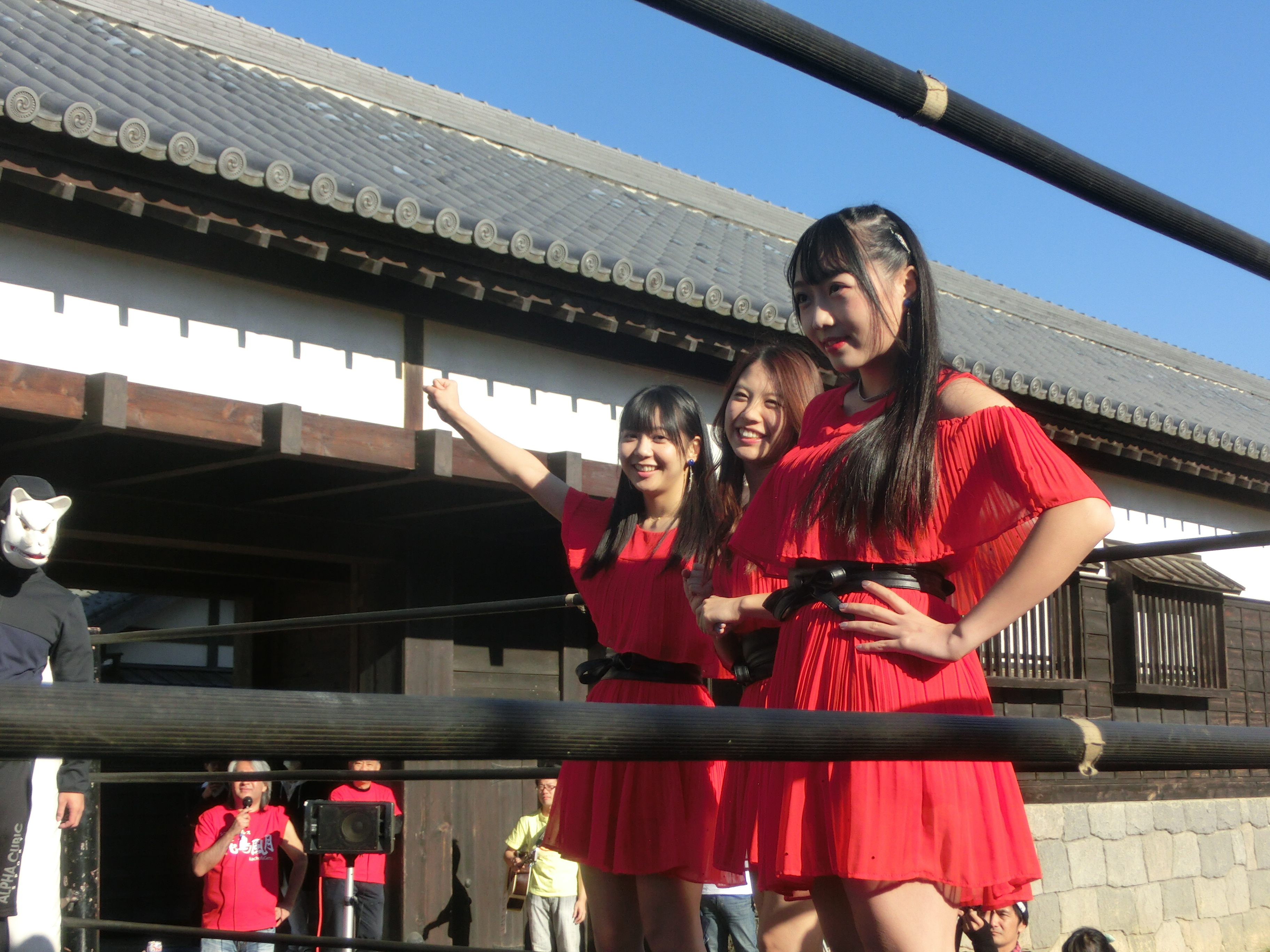 ケミカルリアクション2017年、茨城